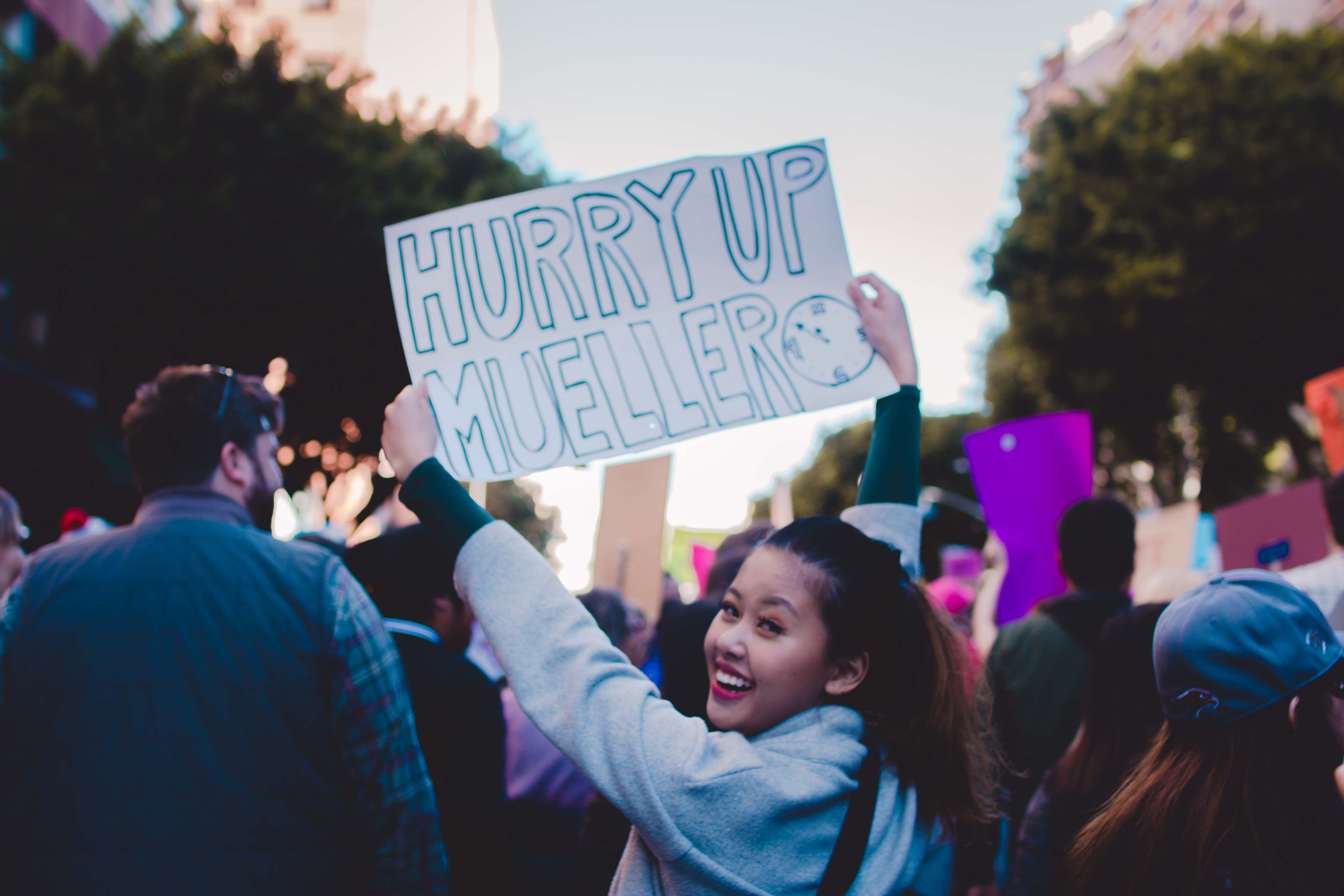 _MG_7987